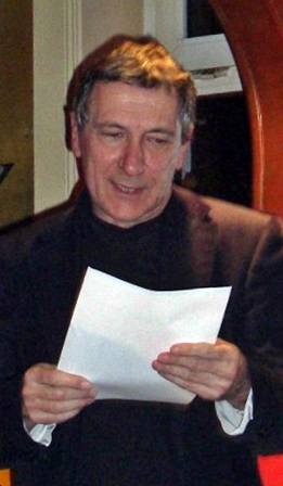 Der Schauspieler Rudolf Kowalski bei einer Lesung im März 2008 in Hamburg